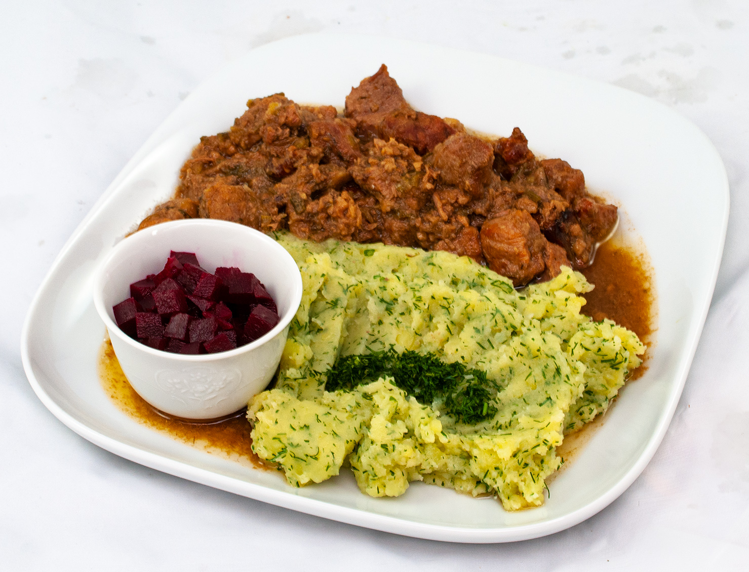 Karjalanpaisti